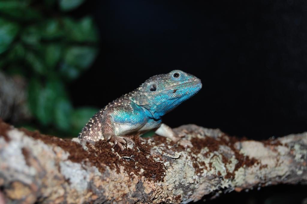 Mâle Xenagama batillifera